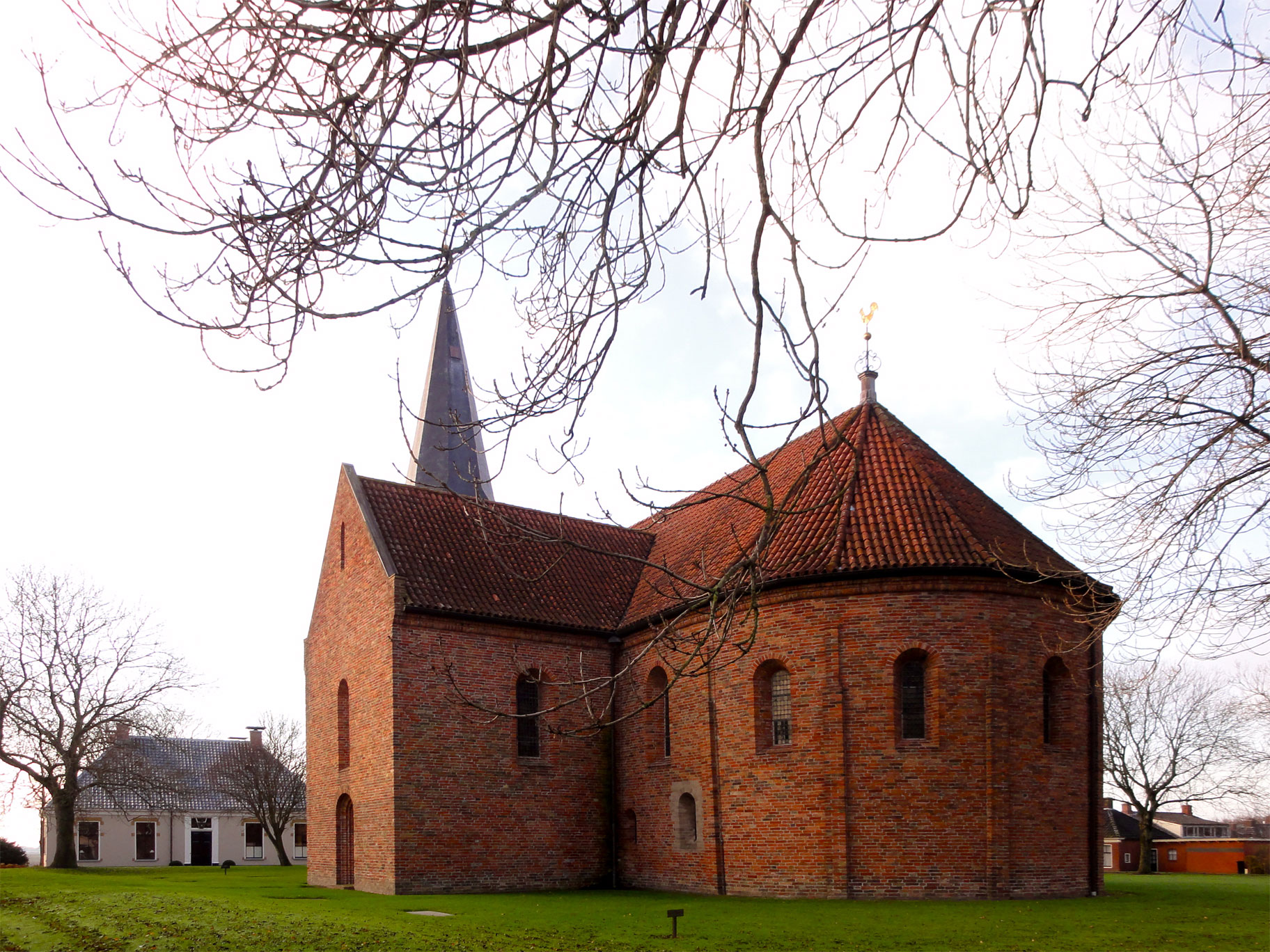 Petruskerk van Leens aan de Zuster A. Westerhofstraat 8